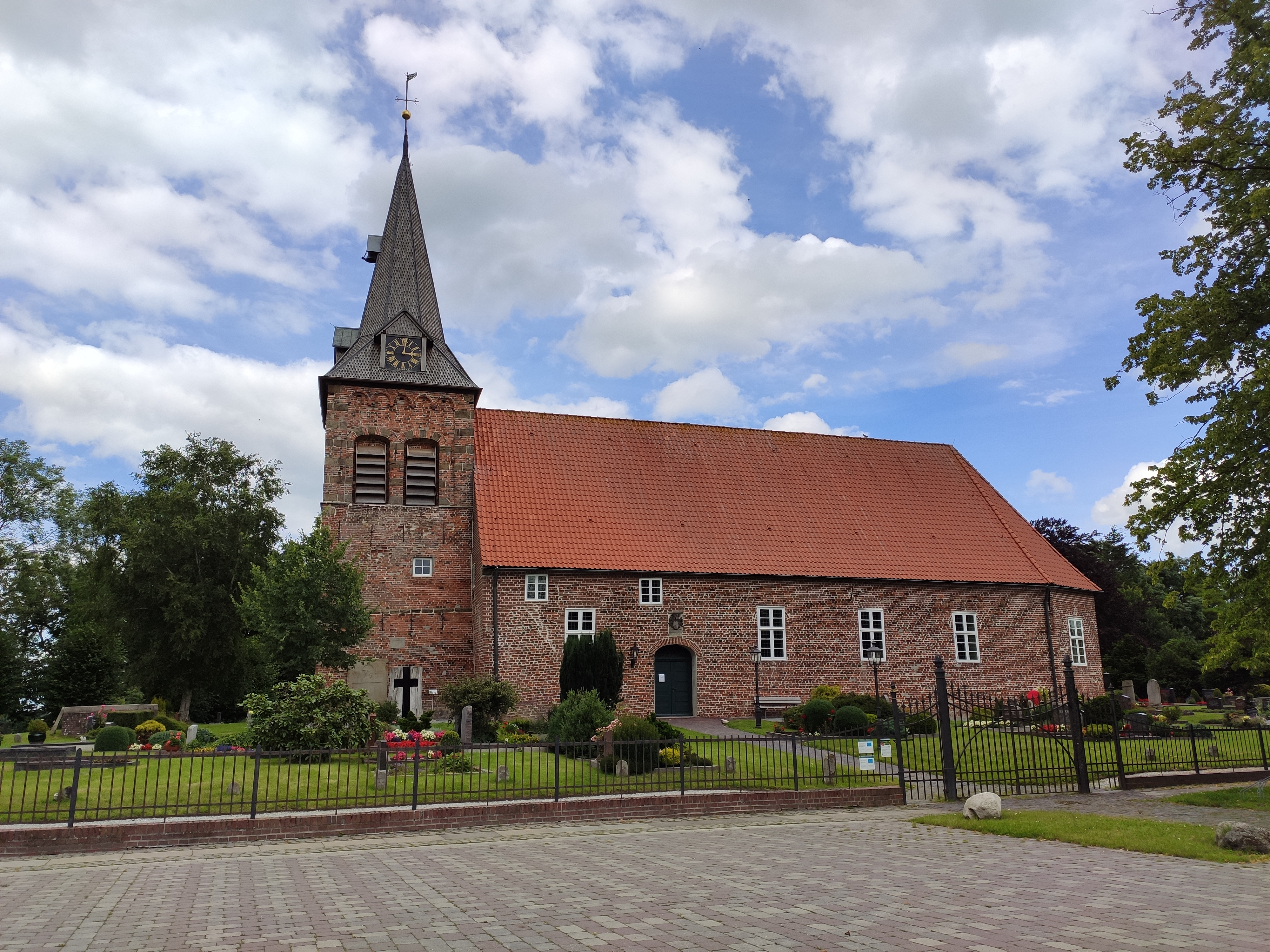 St.-Secundus-Kirche (Schwei) Außenansicht. Aufgenommen am 22.07.2020.